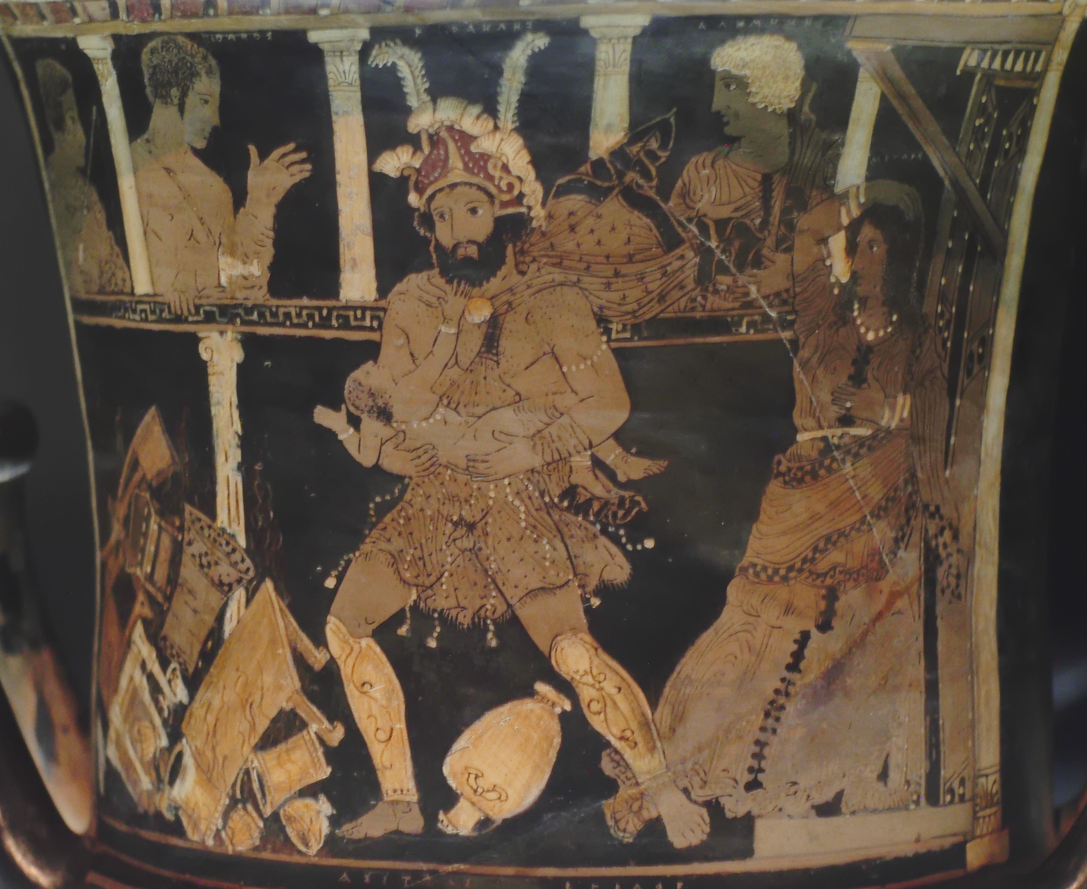 Detalle de cratera de Paestum (350-320 a. C.) en el que aparece una representación teatral. Heracles, enloquecido, va a arrojar a su hijo a las llamas, que consumen ya sus pertenencias. Su esposa, Mégara, lo contempla horrorizada. En la galería aparecen Alcmena, madre del héroe, y su amigo Iolao. A la izquierda la diosa Manía, que representa la locura.